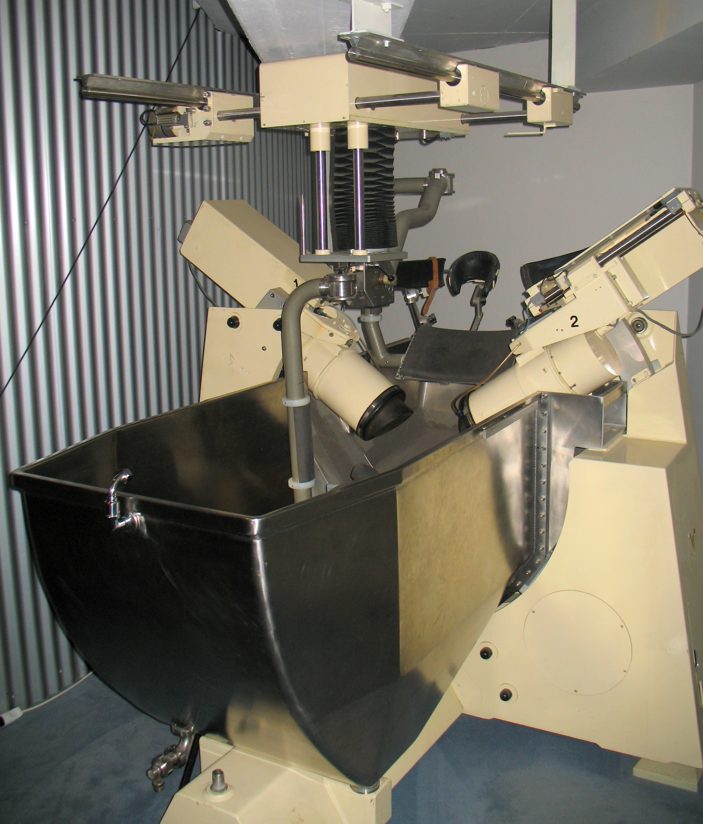 Nierensteinzertrümmerer HM1 Hersteller: Dornier-Medizintechnik GmbH Germering Dieser Nierensteinzertrümmerer wurde 1980 zum ersten mal am Universitätsklinikum Großhadern (München, Deutschland) erfolgreich eingesetzt. Photographiert im Deutschen Museum Bonn